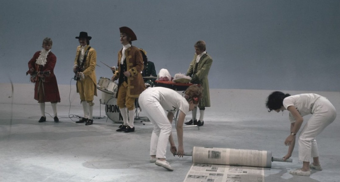 TV programma Moef Ga Ga ; beatgroep Honest Men, met beatmeisjes